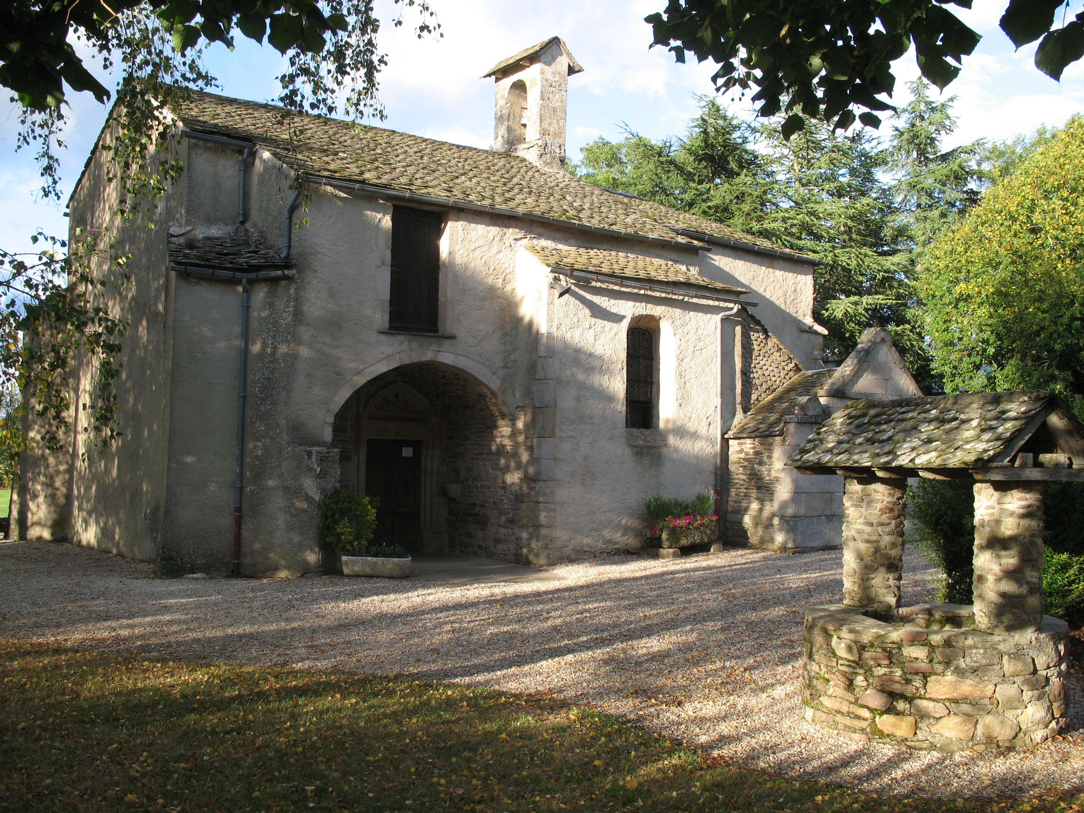 Chapelle Notre-Dame de Salars à Pont-de-Salars dans l'Aveyron.